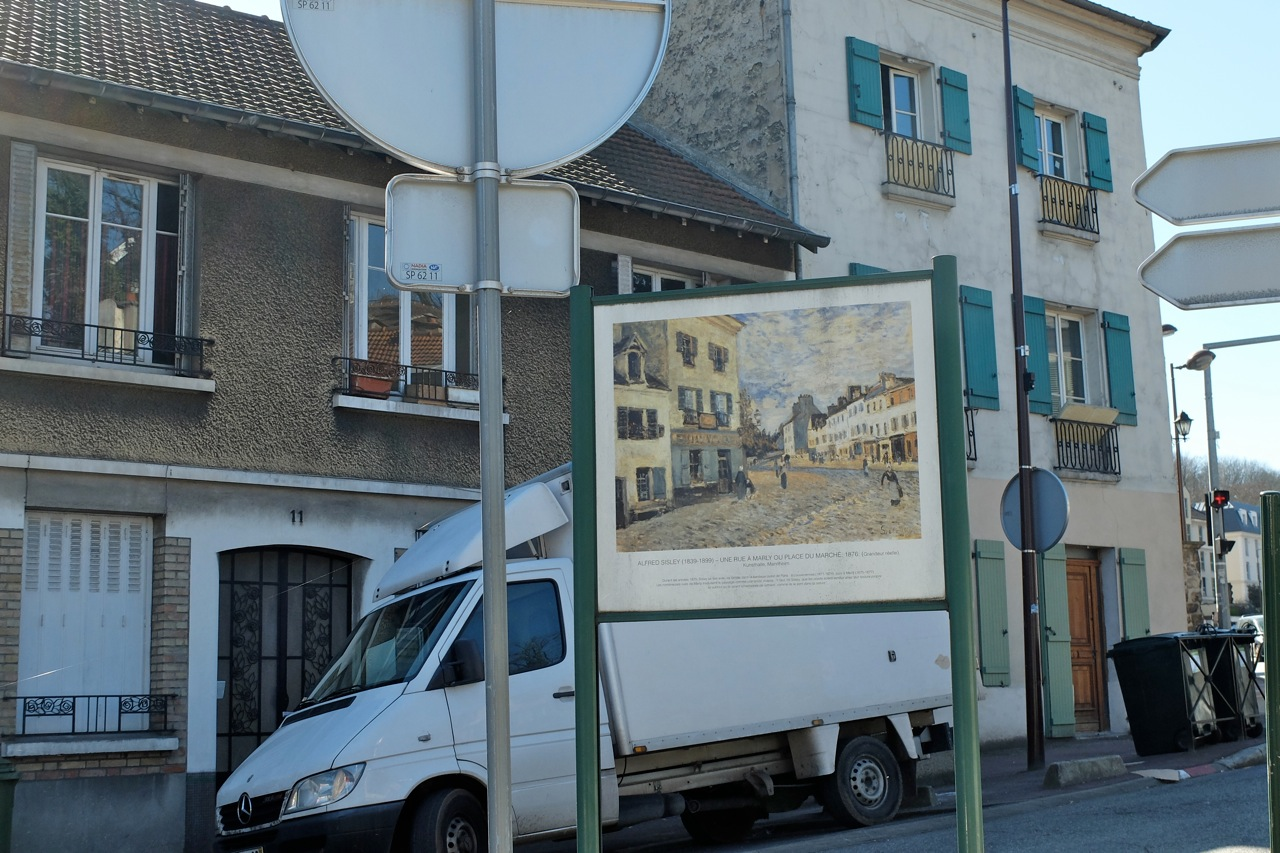 La Rue à Marly, 2013